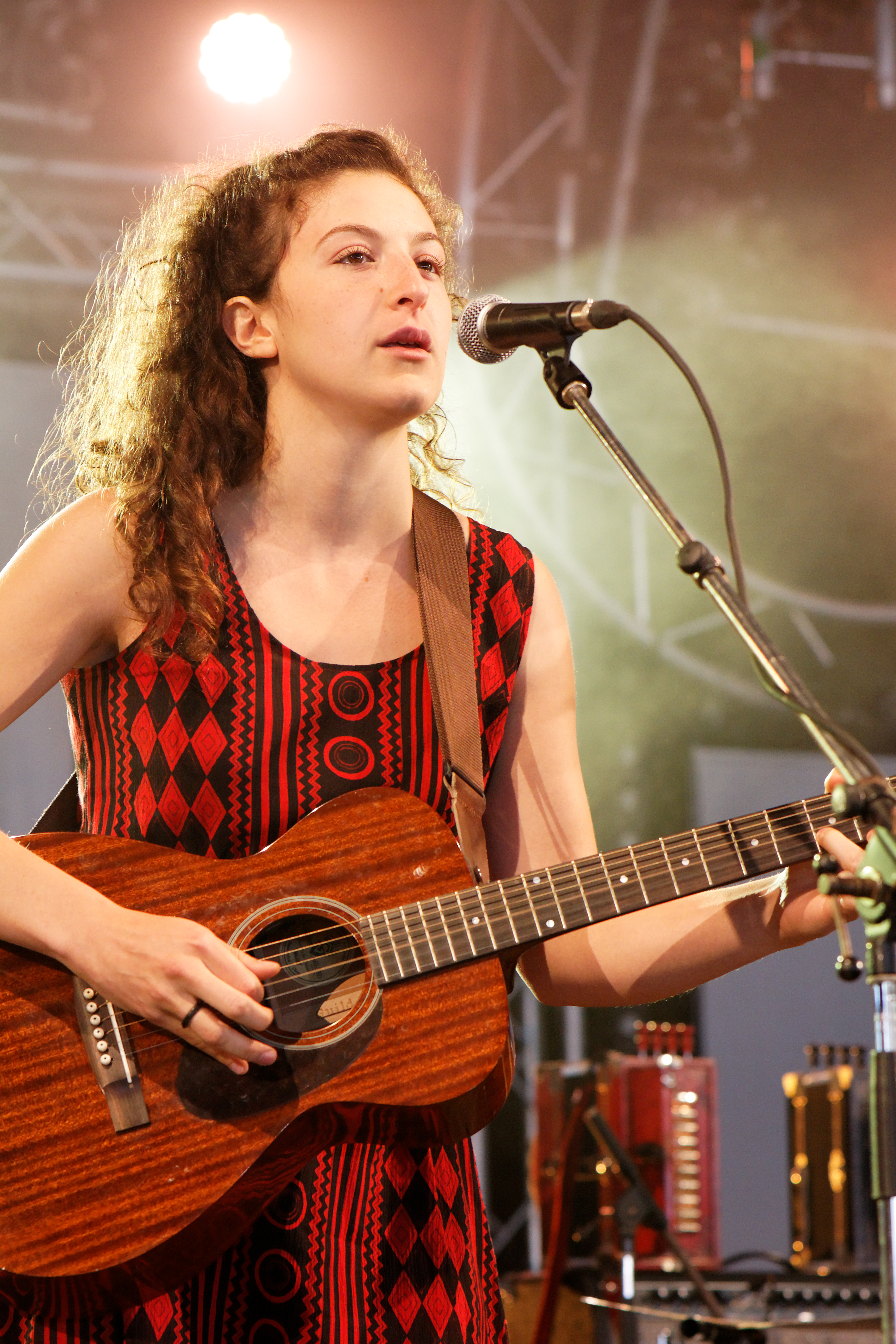 Lail Arad en concert sur la scène cabaret lors du festival du bout du Monde à Crozon dans le Finistère (France).